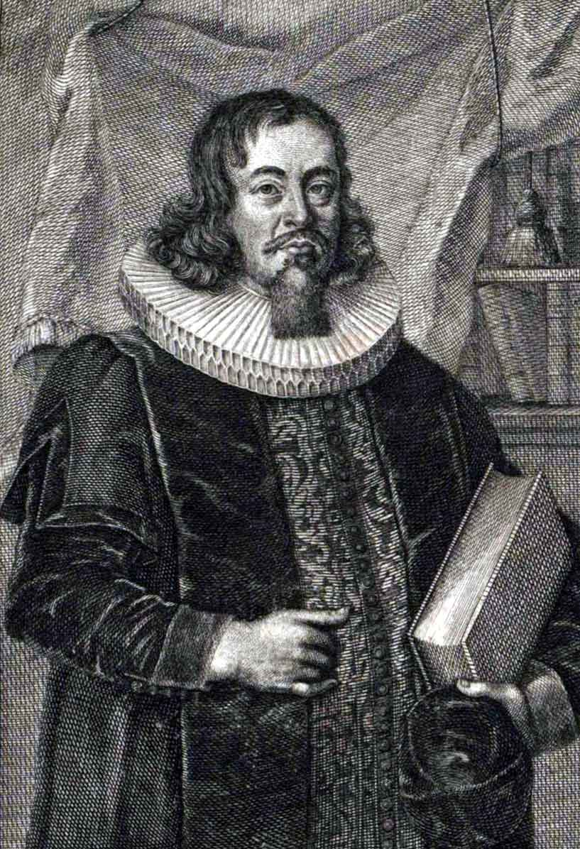 Daniel Lüdemann (1621-1677) Superintendent Bremen 1652 bis 1672, dann Generalsuperintendent Bremen und Verden